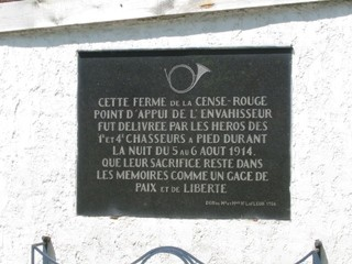 Plaque commémorative relative à la Bataille de Sart Tilman